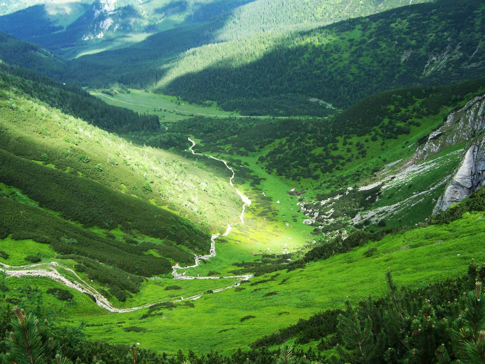 Dolina Kondratowa (Tatra Mountains)